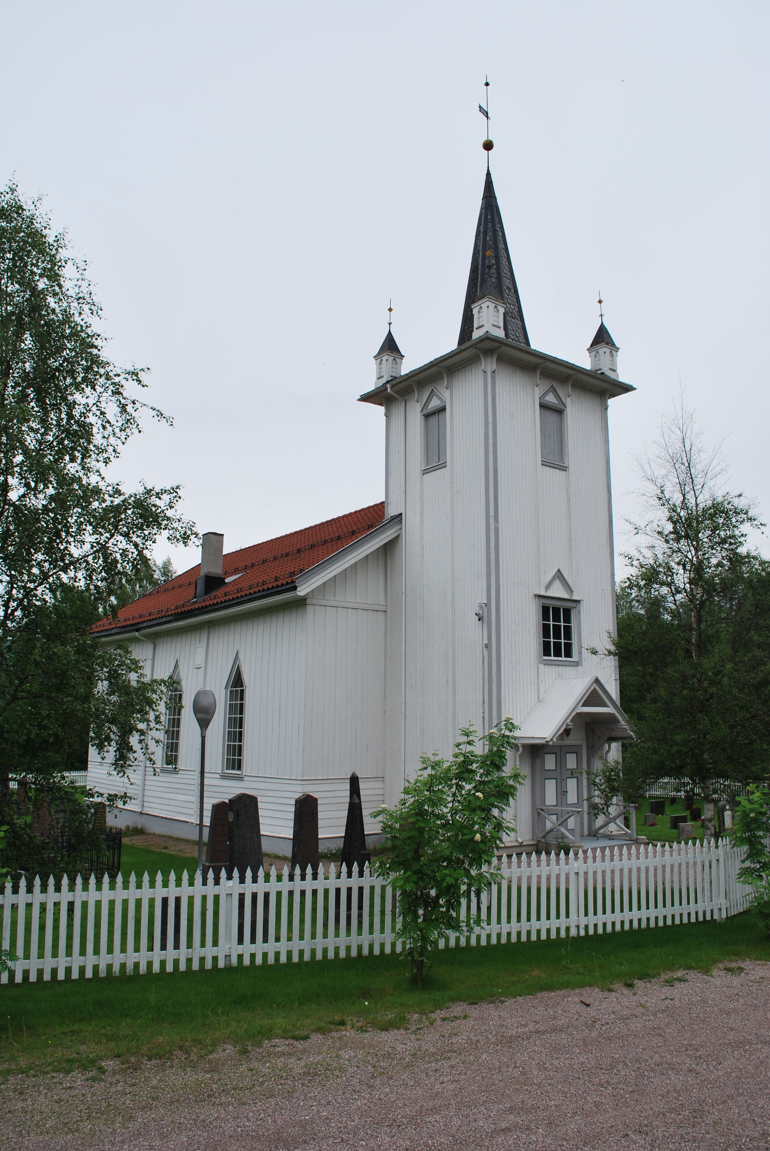 Strand kirke i Stor-Elvdal kommune i Hedmark fylke.